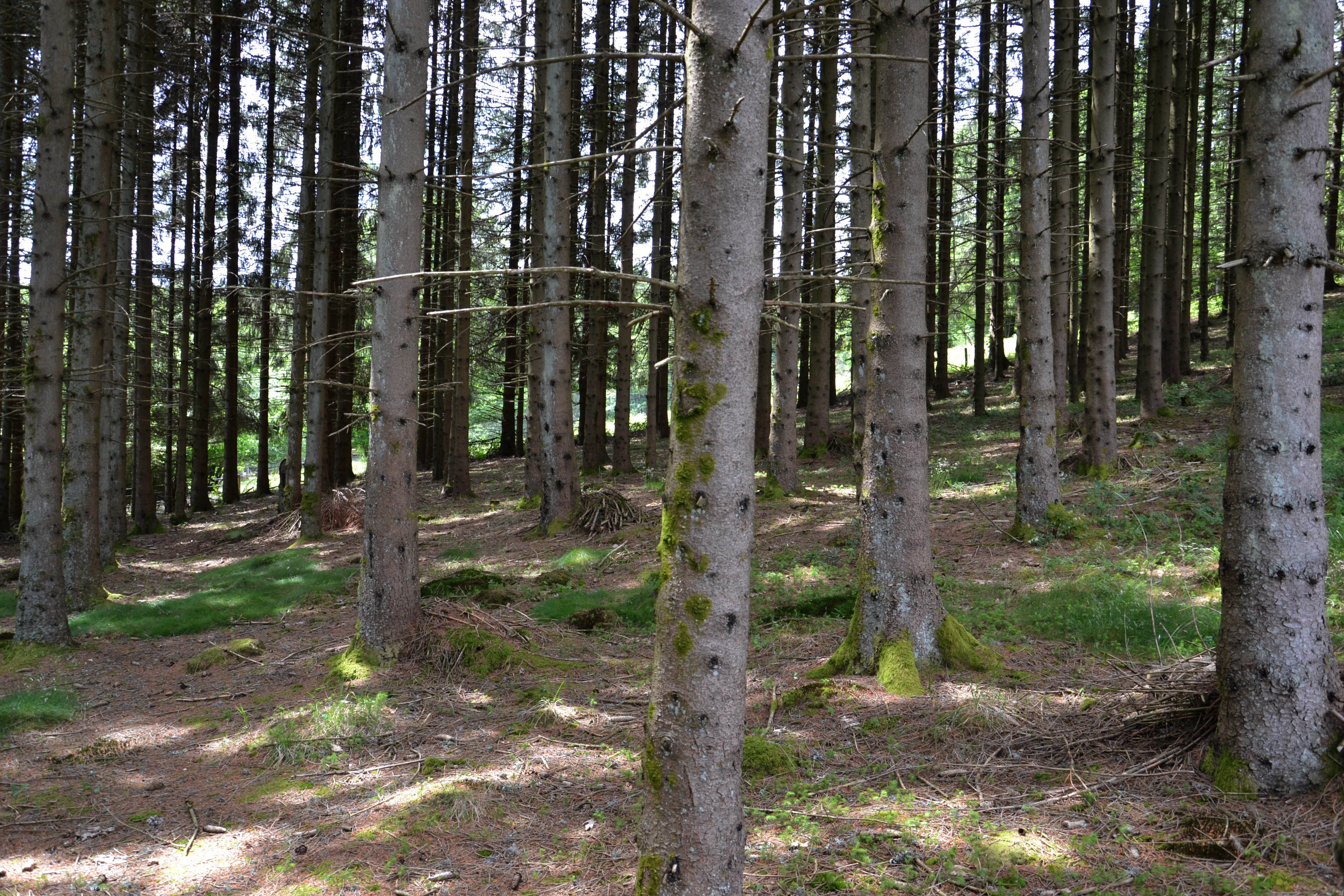 Épicéas en rangs serrés, Le Tholy, Vosges